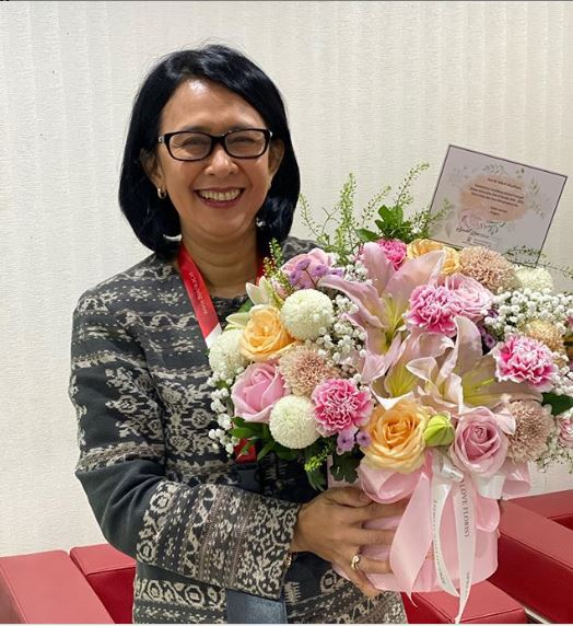 Prof. Sofia Wangsadinata adalah Rektor dan Dosen di Universitas Bakrie.